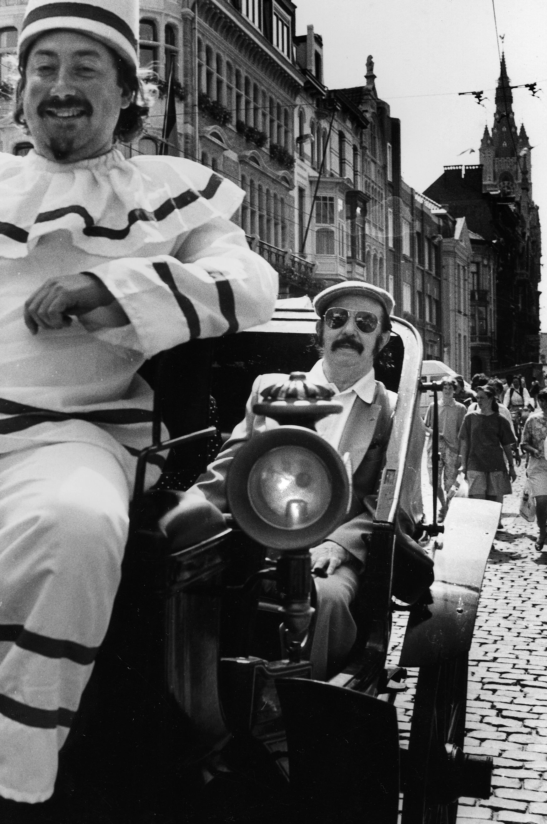 Romain Deconinck met links Luc De Bruycker als Pierke Pierlala. Gentse Feesten, 1989.